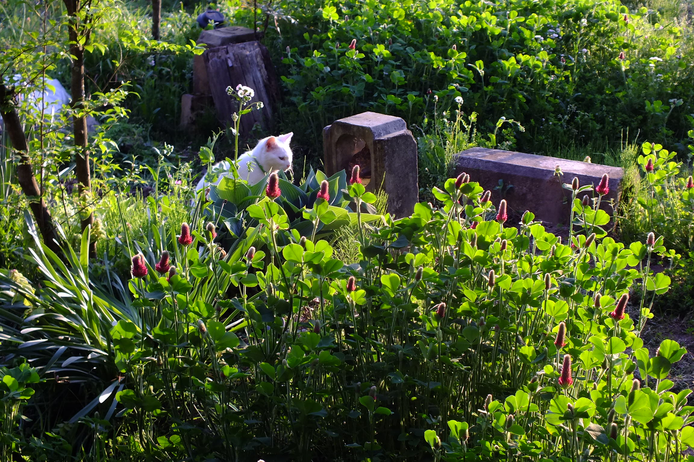 2015-04-27 Trifolium incarnatum(Strawberry candle) ベニバナツメクサ